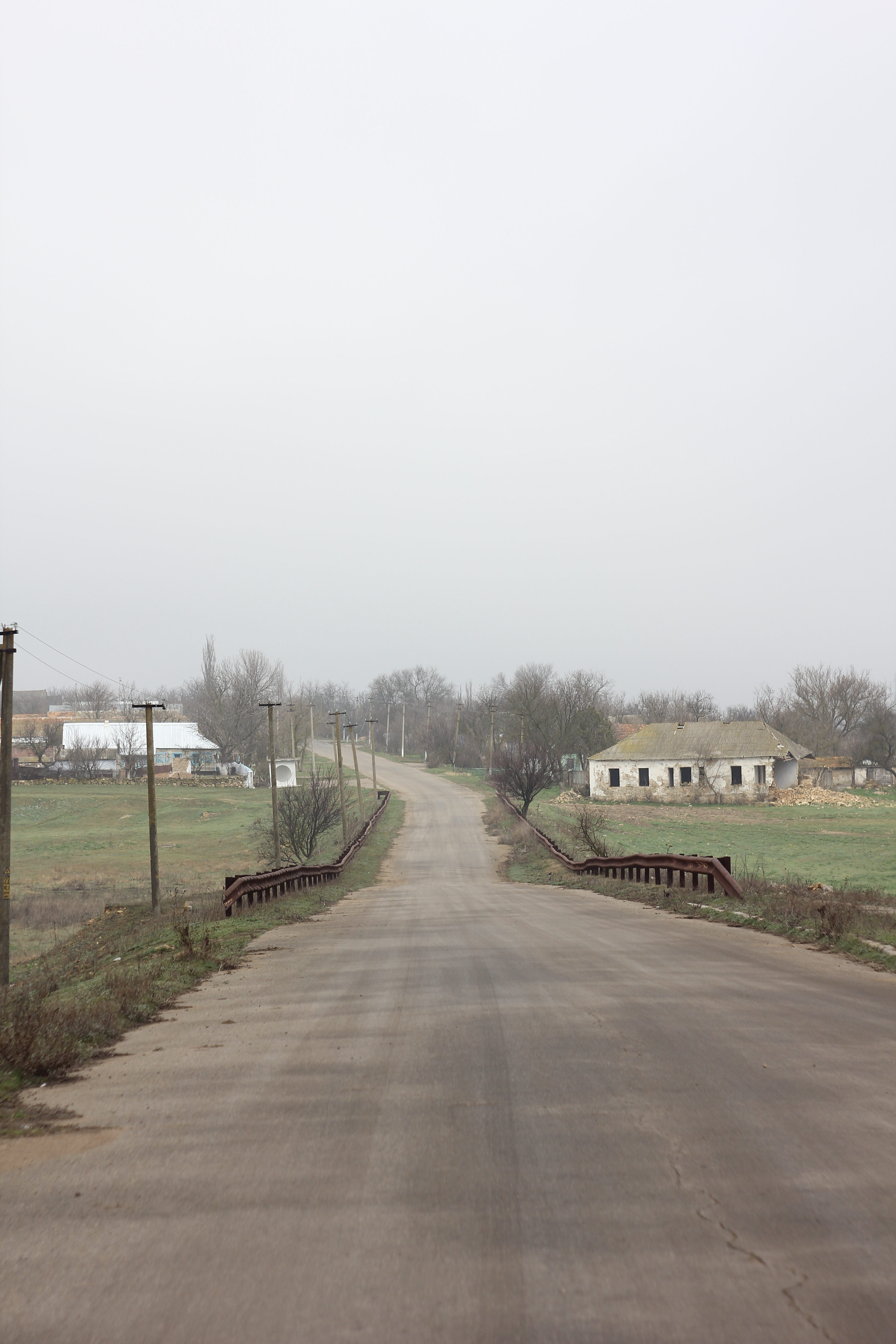 Novoselovka (Mykolaiv region)